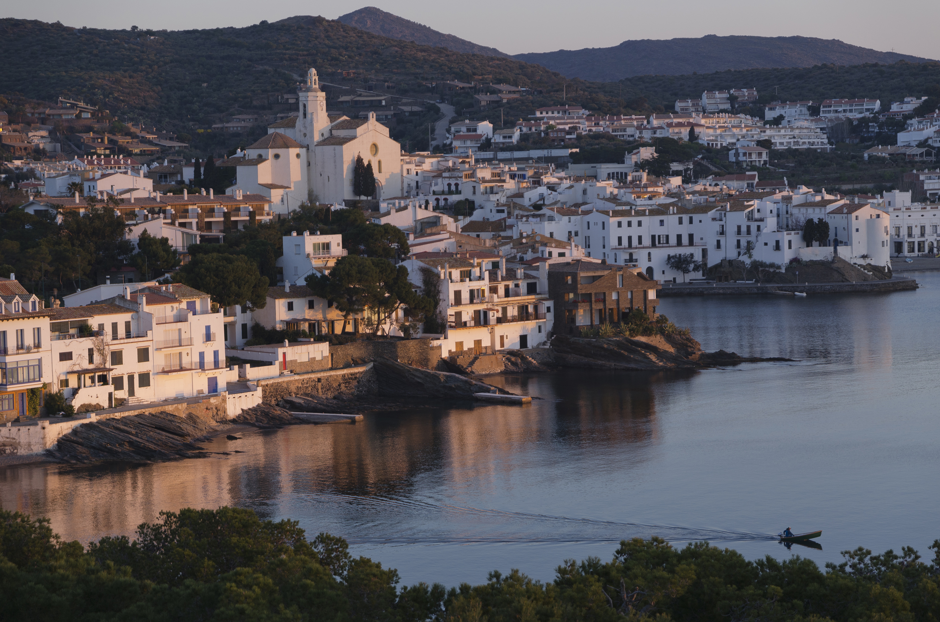 Lever de soleil, baie de Cadaques